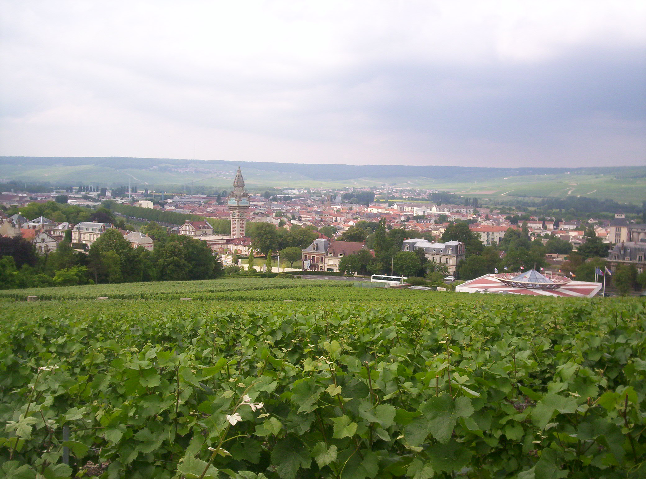 Vue sur Épernay depuis le Mont Bernon. Prise le 25 juin 2006.